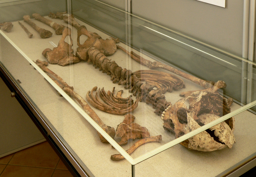 Bestattung einer etwa 25-jährigen Frau von 1,64 Meter auf dem Gräberfeld von Gevensleben